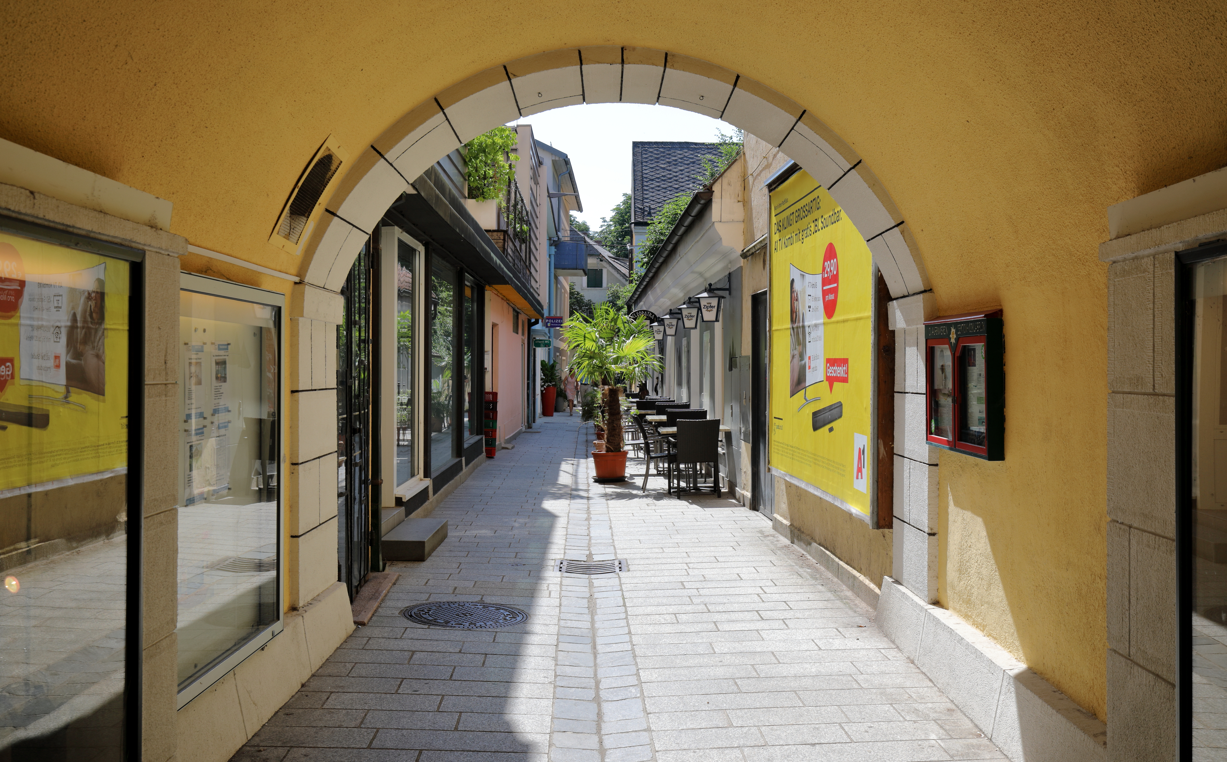 Durchgang vom Stadtplatz zur Hinterstadt in der oberösterreichischen Stadt Vöcklabruck.